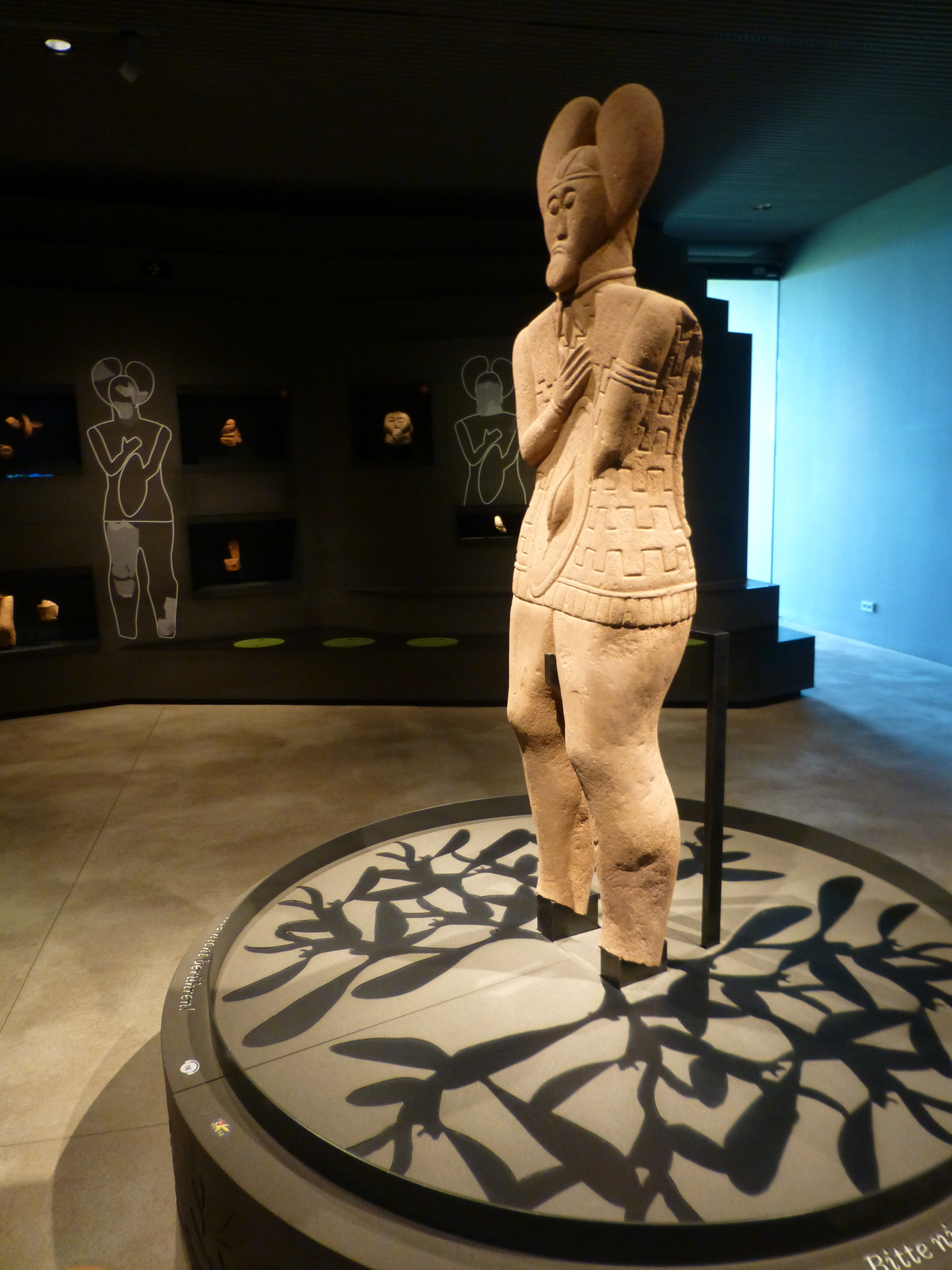 Statue des Keltenfürsten; an der Wand dahinter Bruchstücke von anderen Statuen